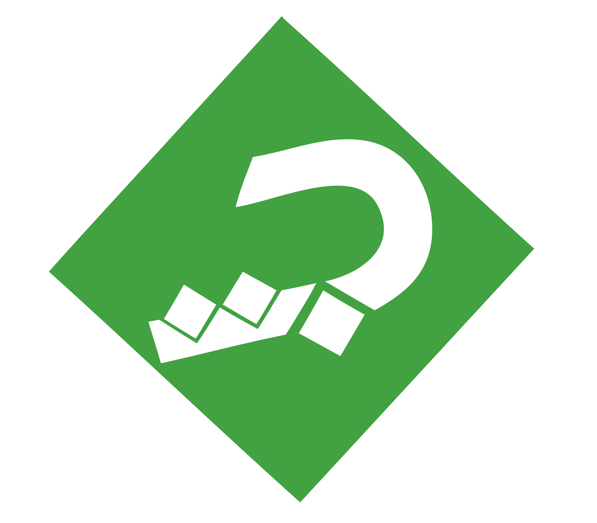 لوغو أكاديمية جيل الترجيح